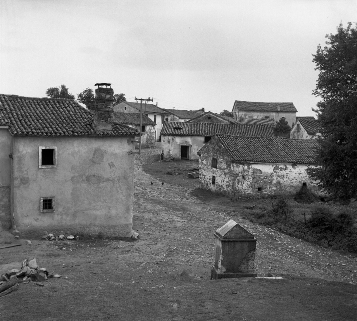 Del vasi Sabonje.